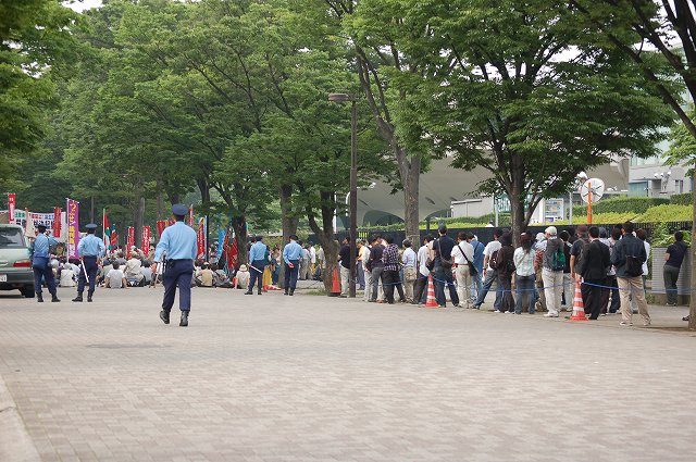 警視庁公安部の私服捜査員